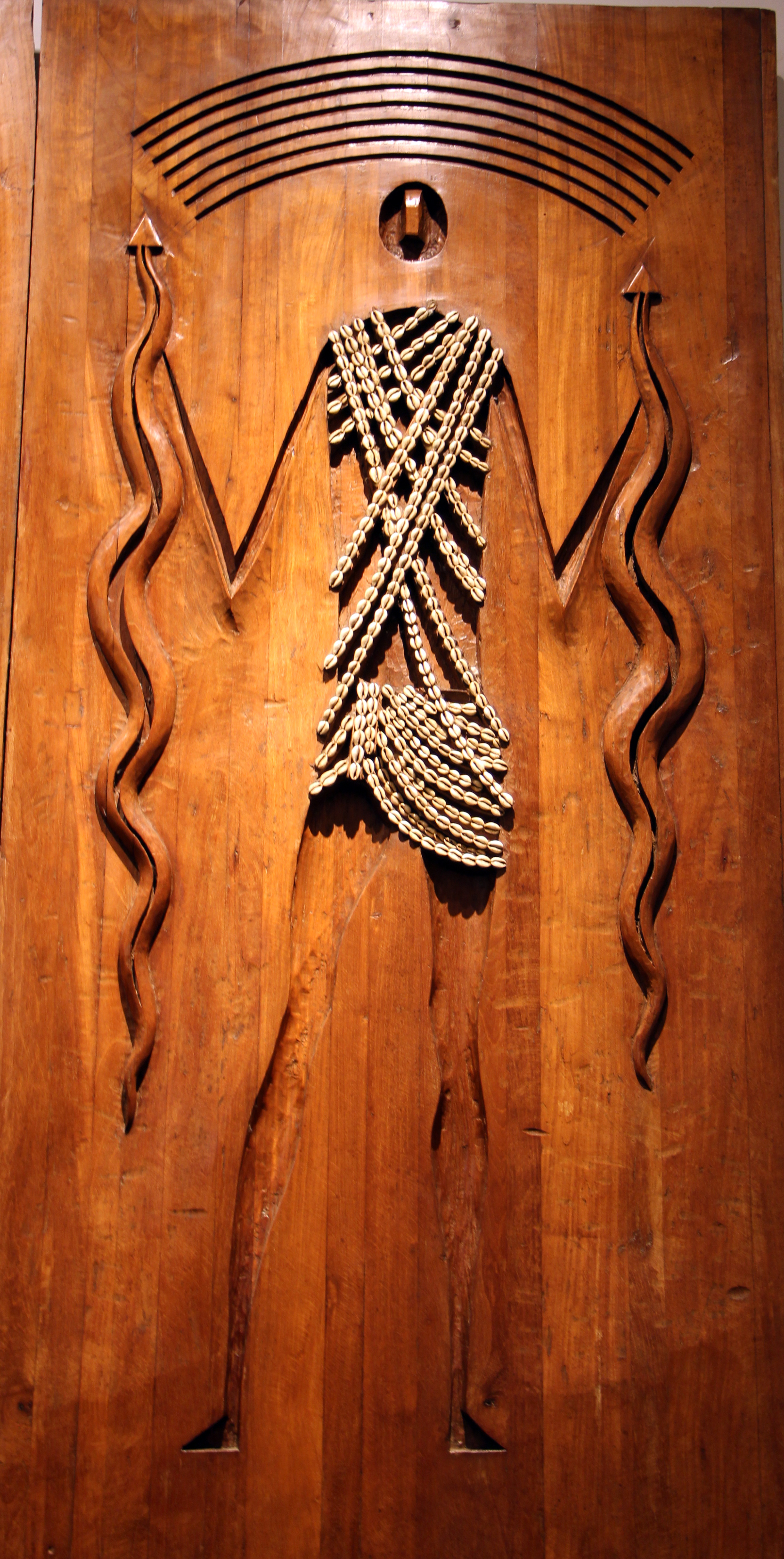 Candomblé nel Museu Afro-Brasileiro, Salvador